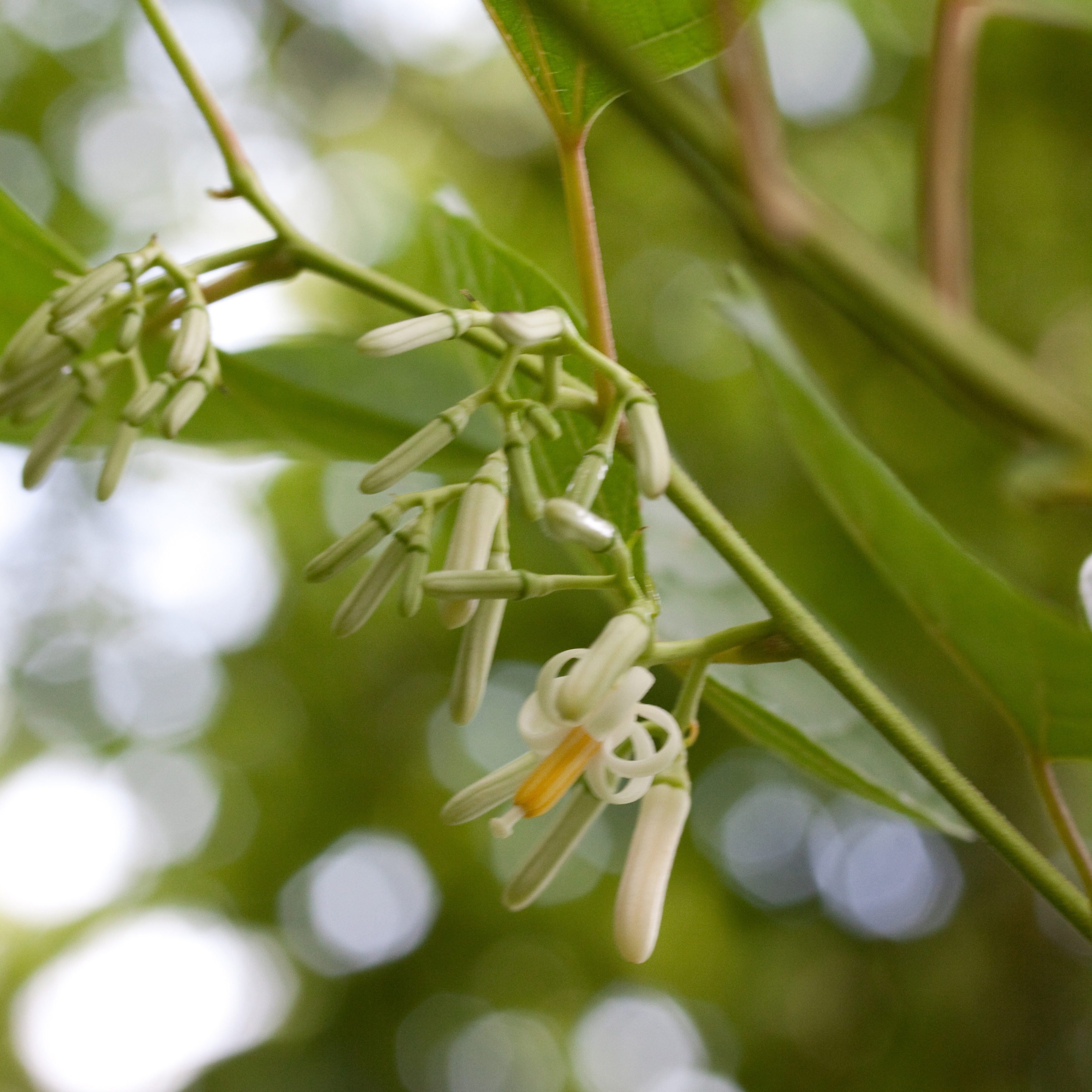 Alangium chinense - Fleurs - Jardin botanique de Strasbourg - France